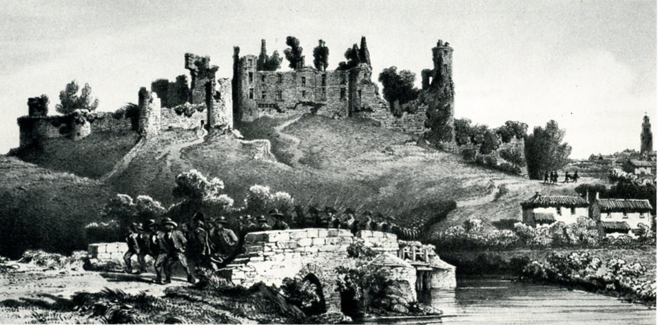 Vue de Bressuire